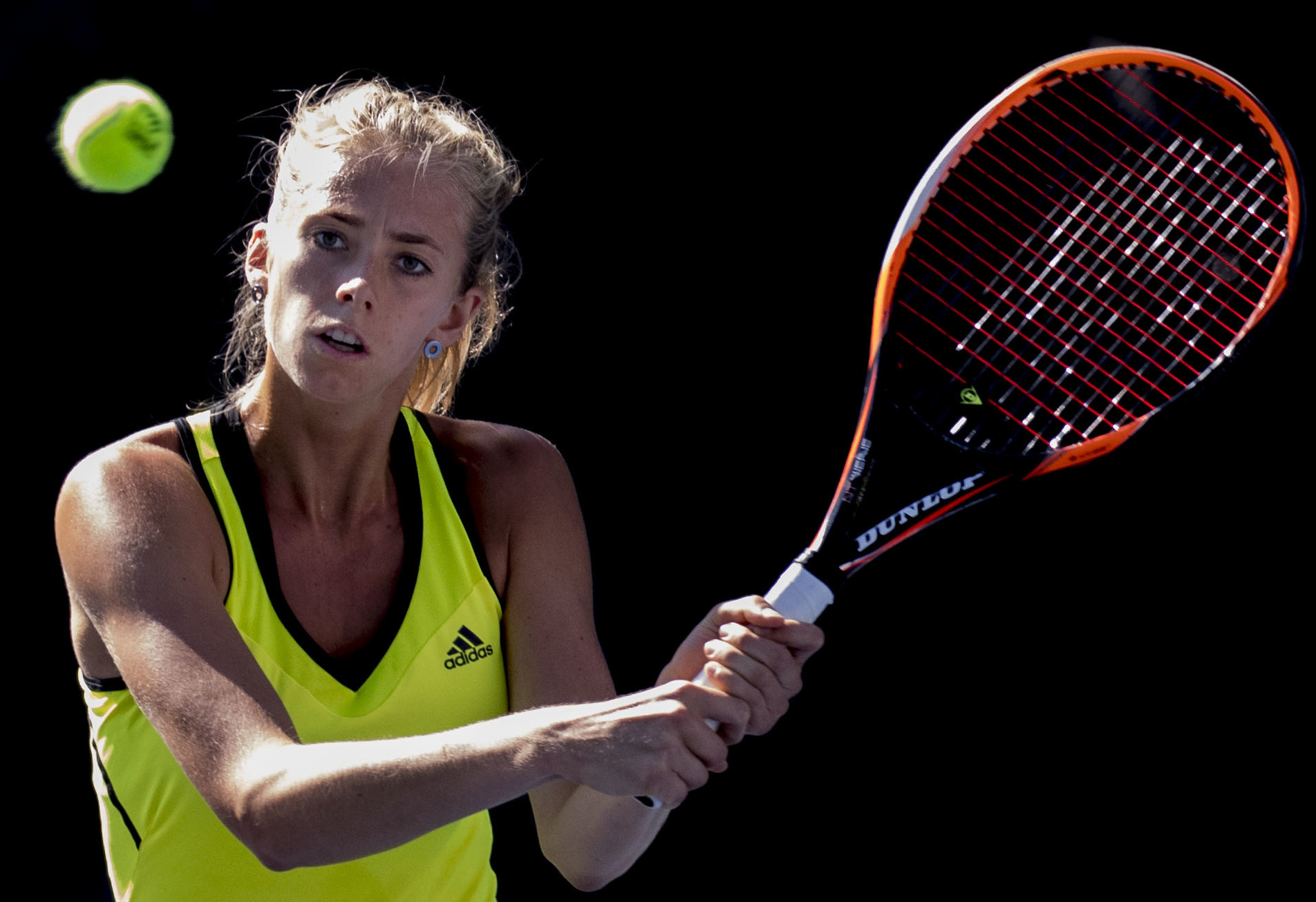 Citi Open Tennis 2017